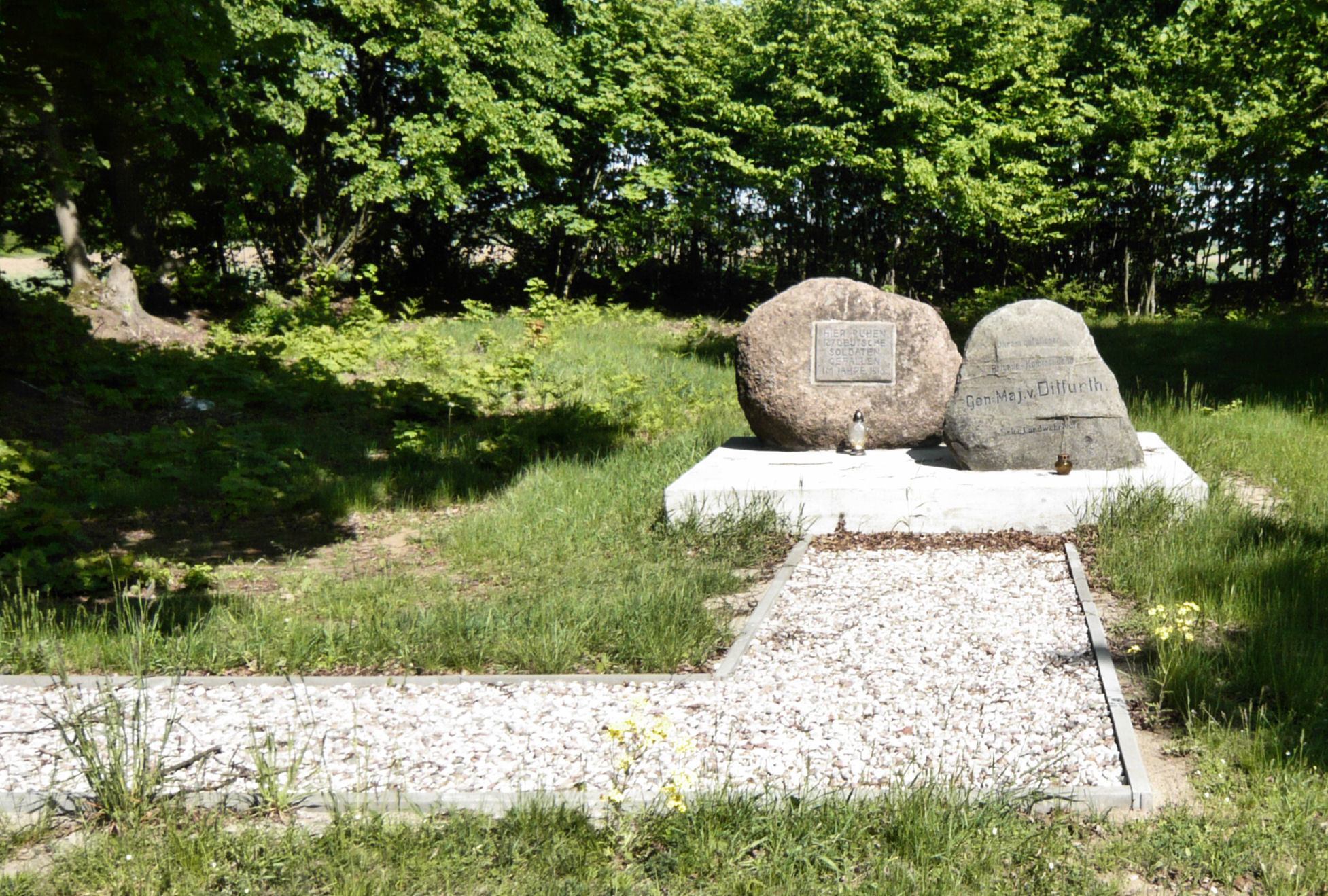 Cmentarz z I wojny światowej w Karwowo-Konotapa